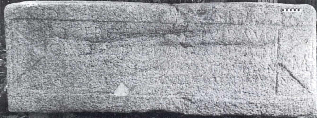 Fara Novarese, Palazzo Contini-Dessilani, Sarcofago di Lucio Luperco